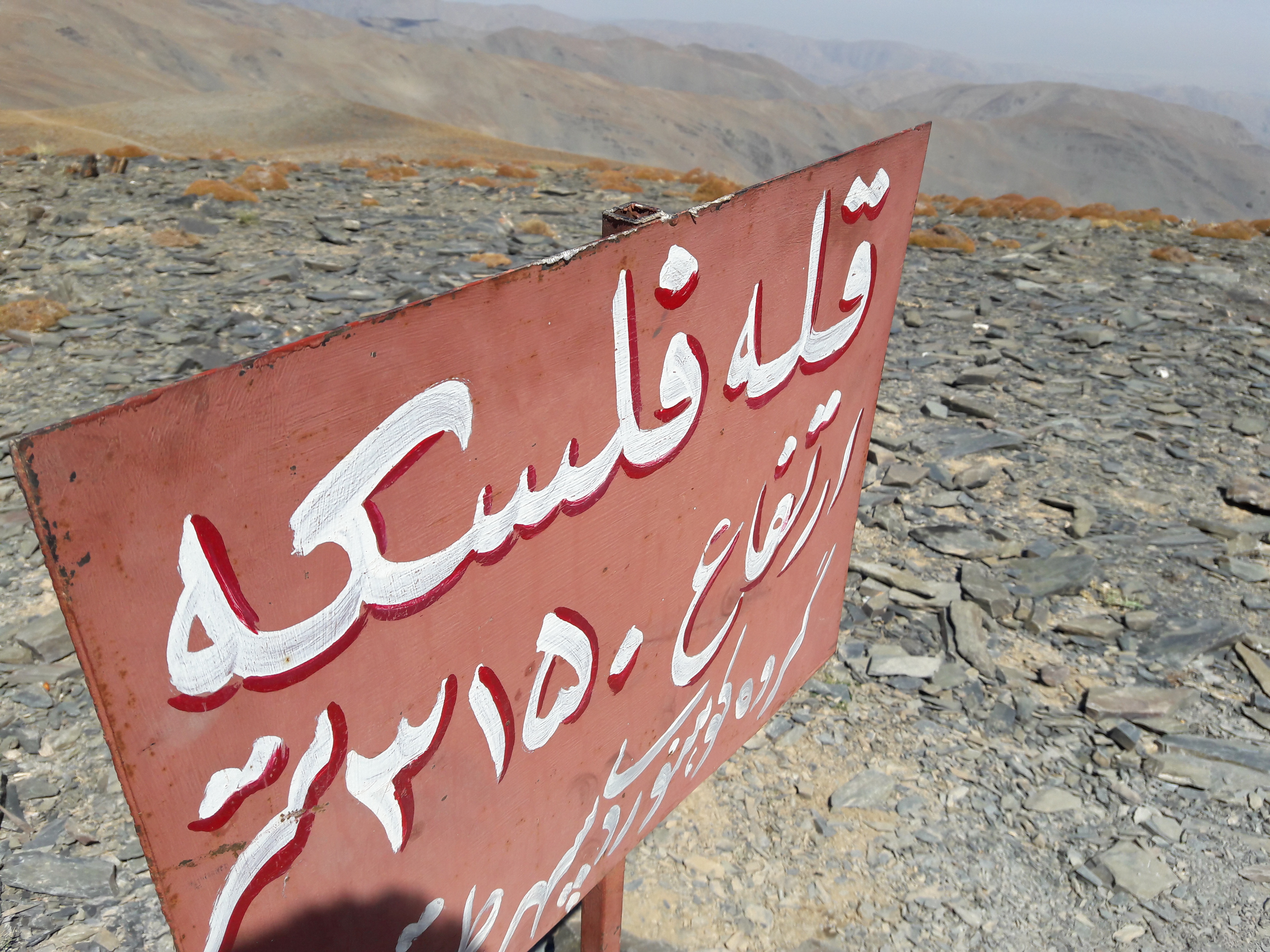 تابلو نصب شده روی قله فلسکه